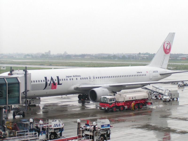 Boeing 767-300 an First Ship(JA8236) an Matsuyama(RJOM)